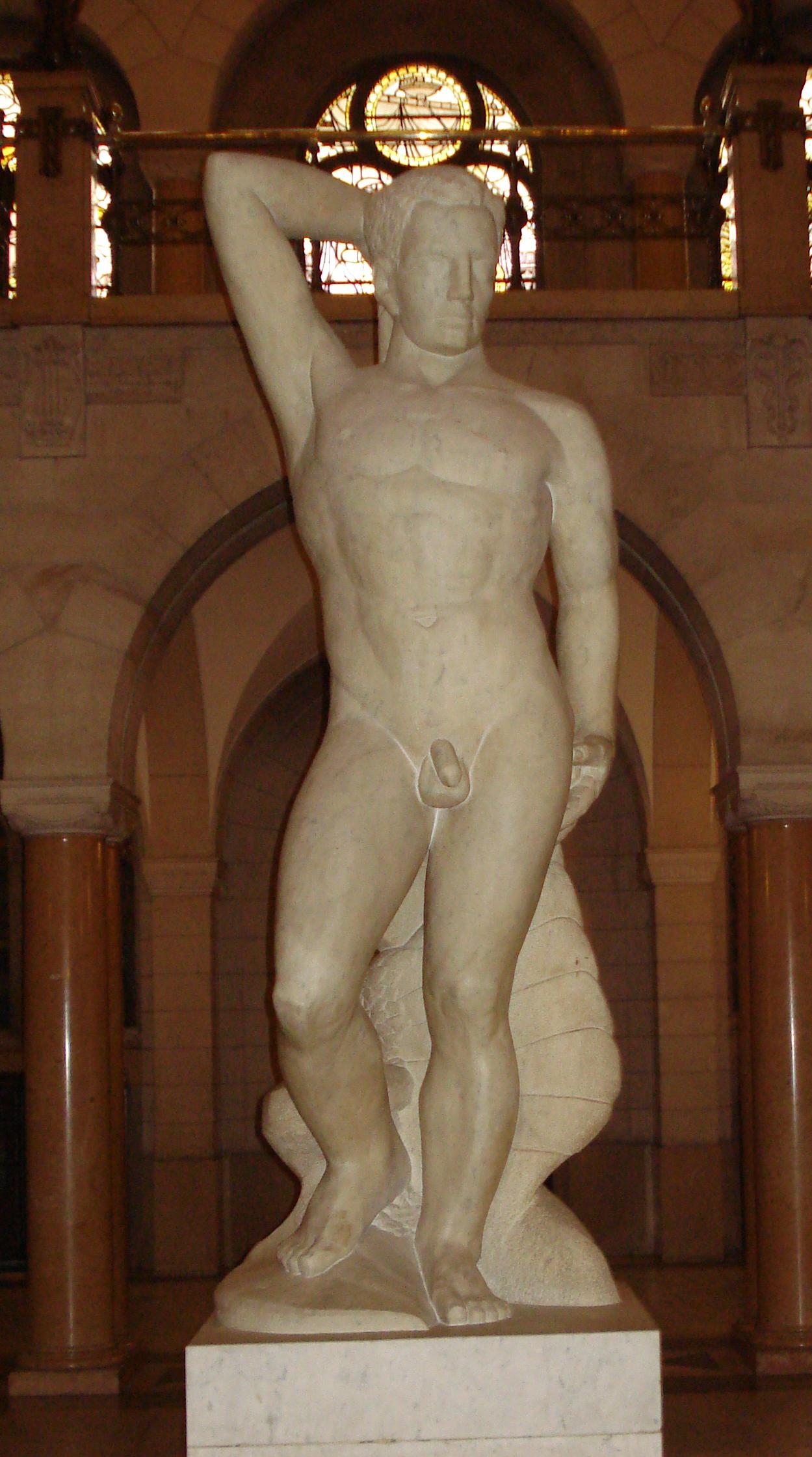 Rotterdam, stadhuis. Beeld "Sterker door strijd" van Hank Hans. Rotterdam/The Netherlands.